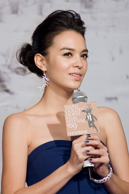 Sandrine Pinna (張榕容) at Golden Horse Flim Festival